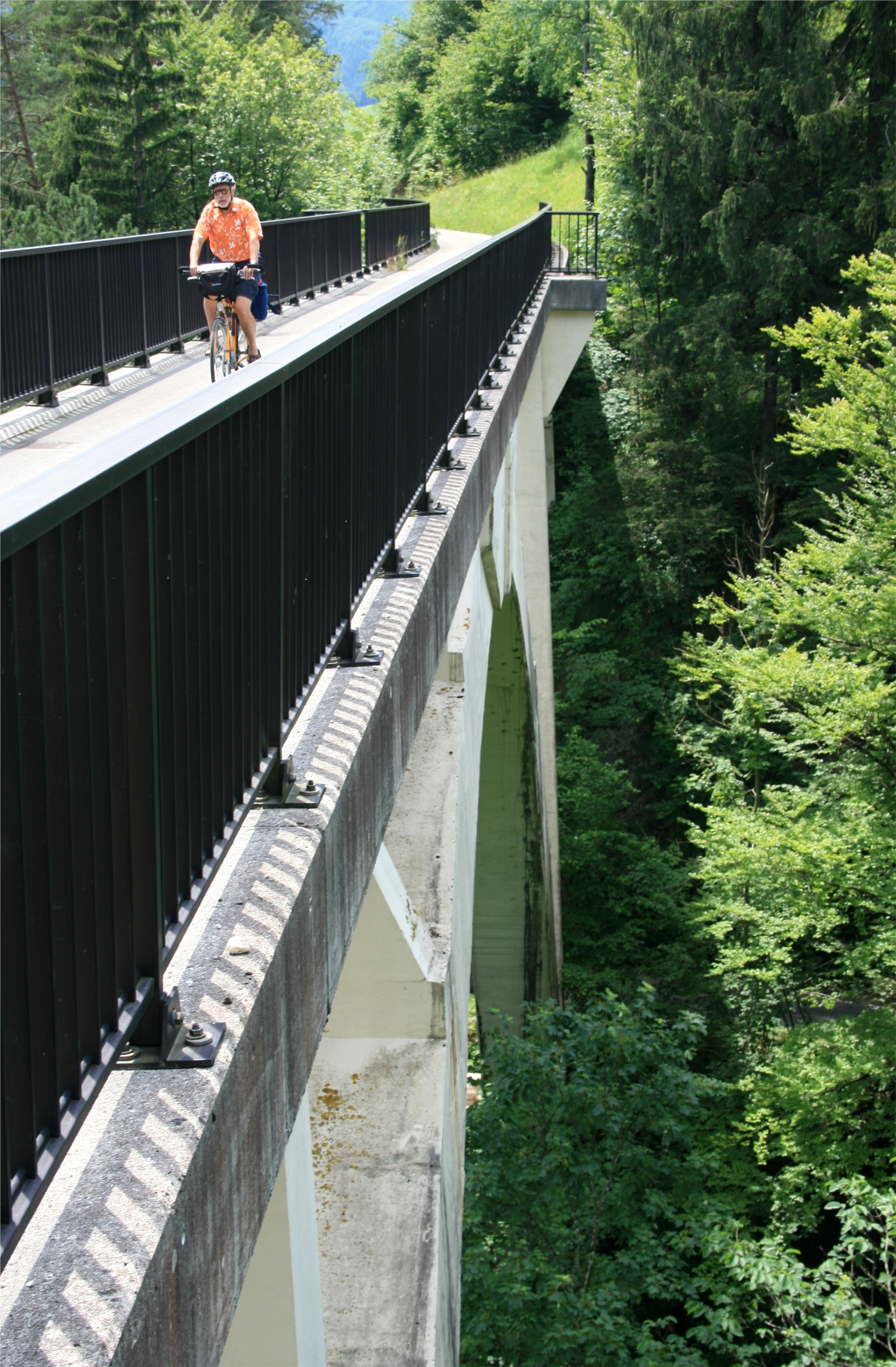 Ehemalige Brücke der heutigen Steyrtal-Museumsbahn über den Tiefengraben bei Steyrdurchbruch (Grünburg/Micheldorf in Oberösterreich). Heute nutzt der Steyrtalradweg diesen Teil der Trasse.